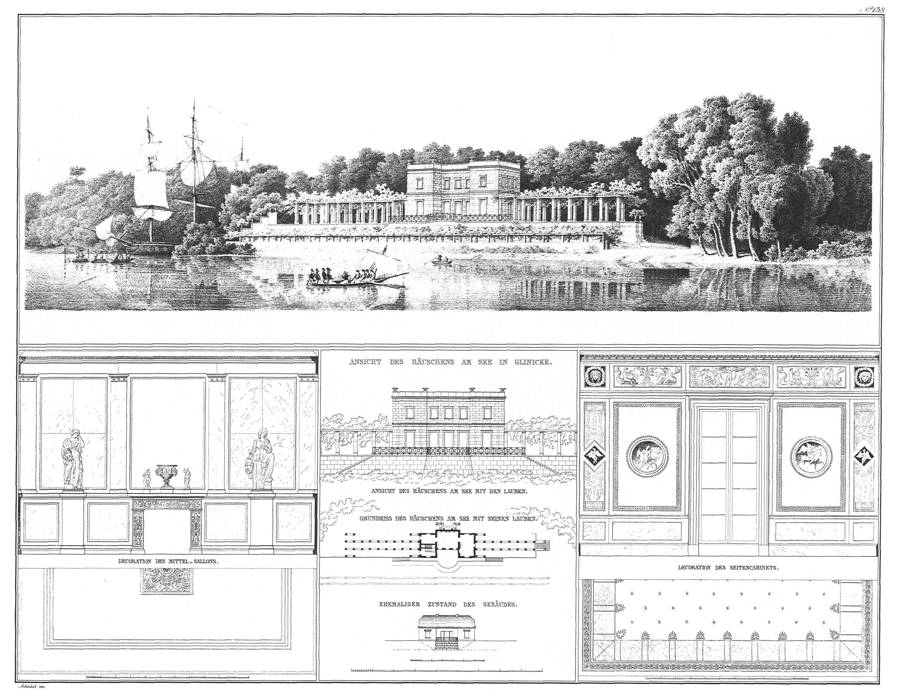 Berlin, Park Glienicke: Kasino